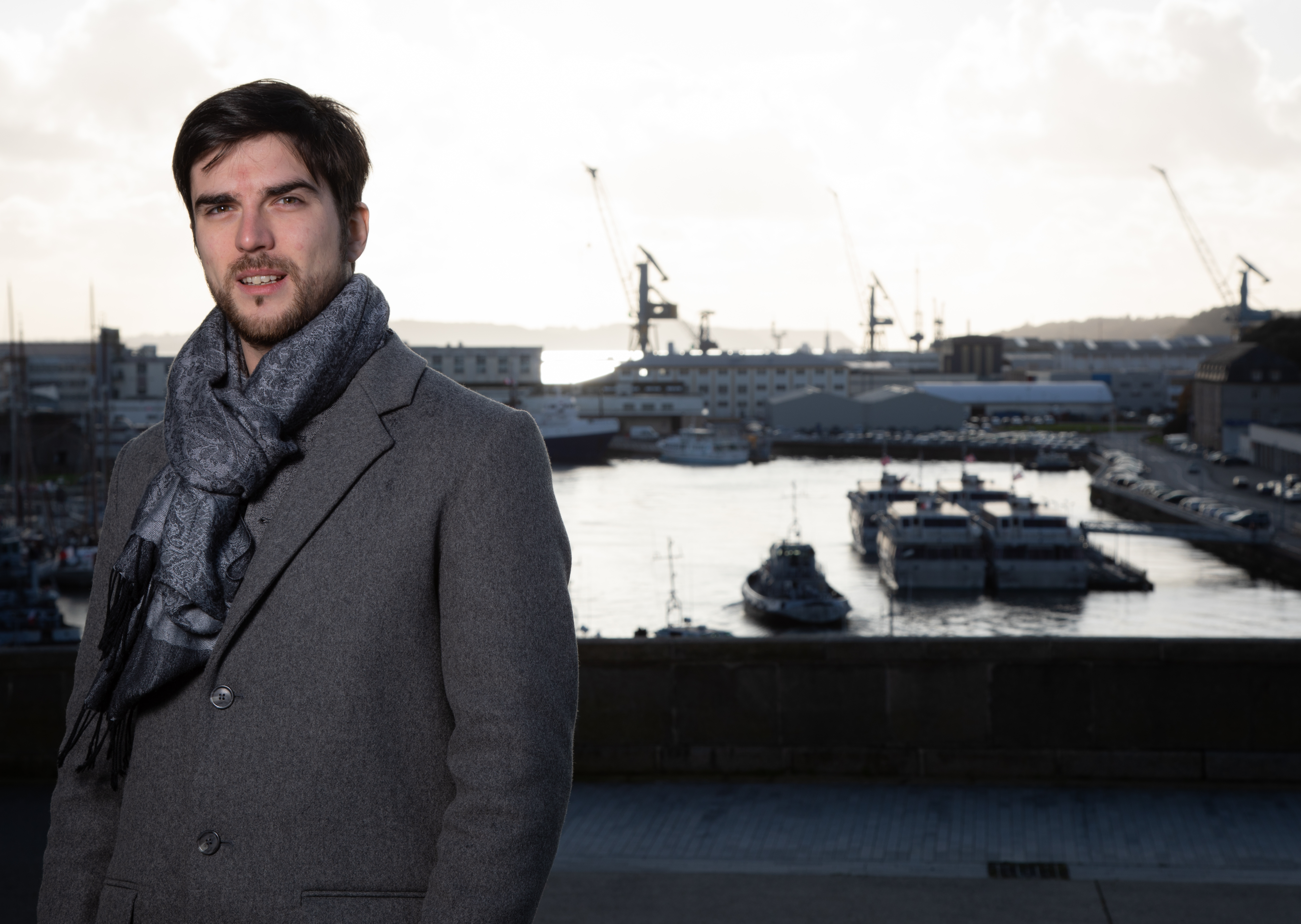 Pierre-Yves Cadalen, Brest, novembre 2019